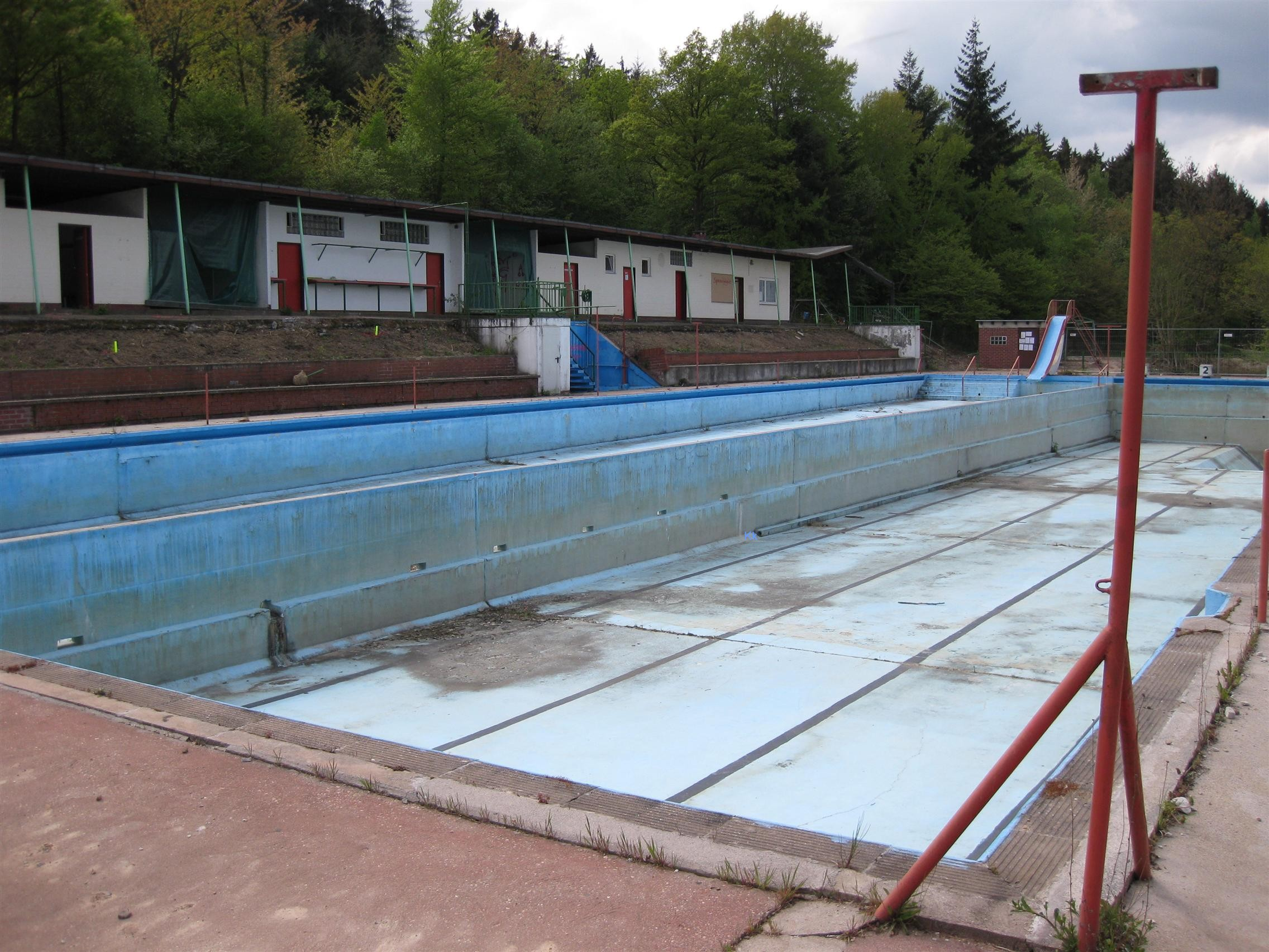 Höhenfreibad Stromberg vor dem Abriss, Aufnahme vom 25. April 2009